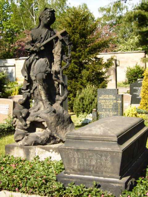 Dresden Alter Kath. Friedhof an der Friedrichsstr., Grab des Bildhauers Balthasar Permoser